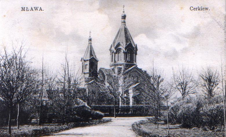 Cerkiew św. Jerzego w Łomży